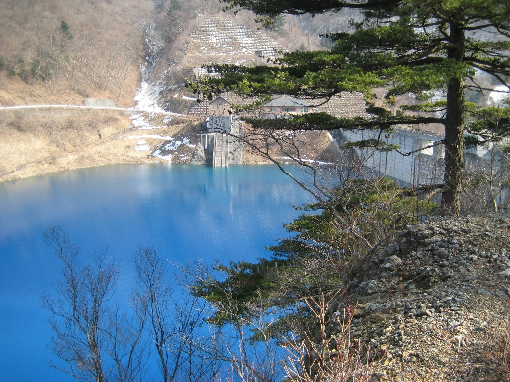 Dam-Lake on Shimawaga Dam / Gunma pref. Japan